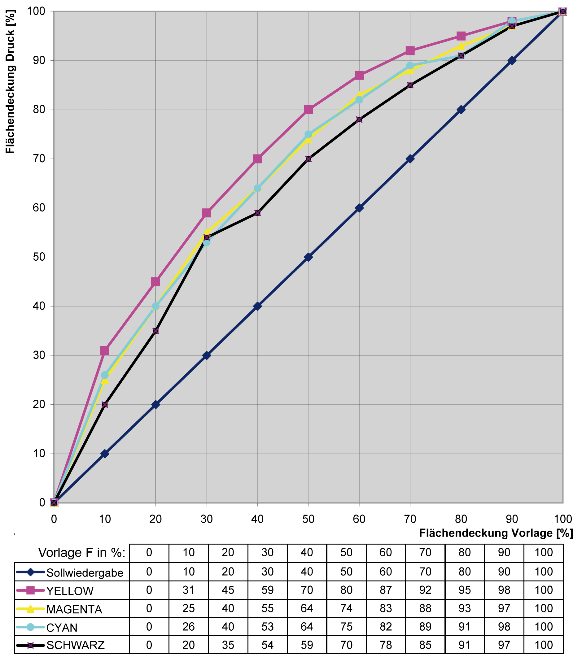 Druckkennlinie mit Werten